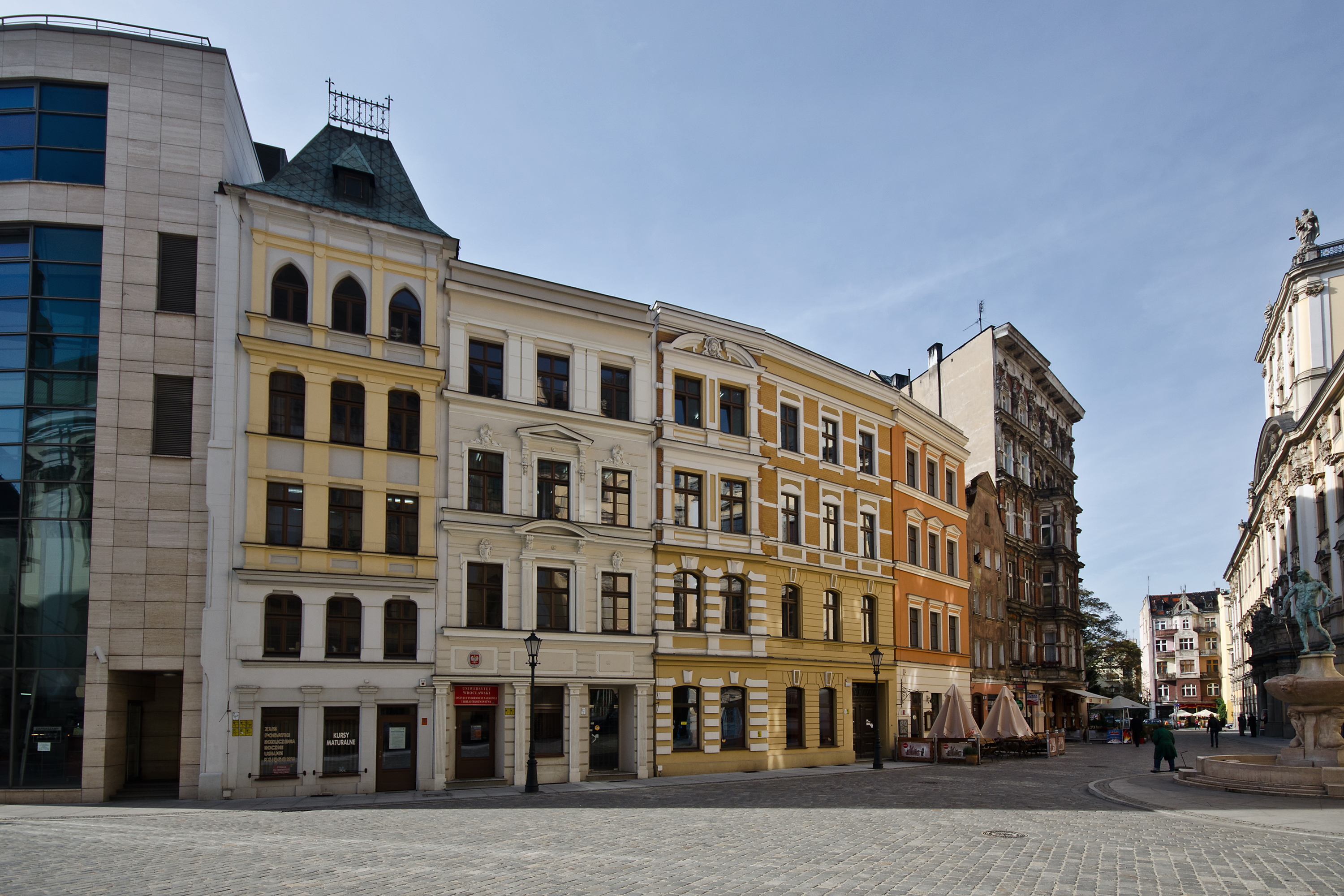 Kamienice pl. Uniwersytecki 10, 11/12, 13, Miasto Wrocław - Stare Miasto